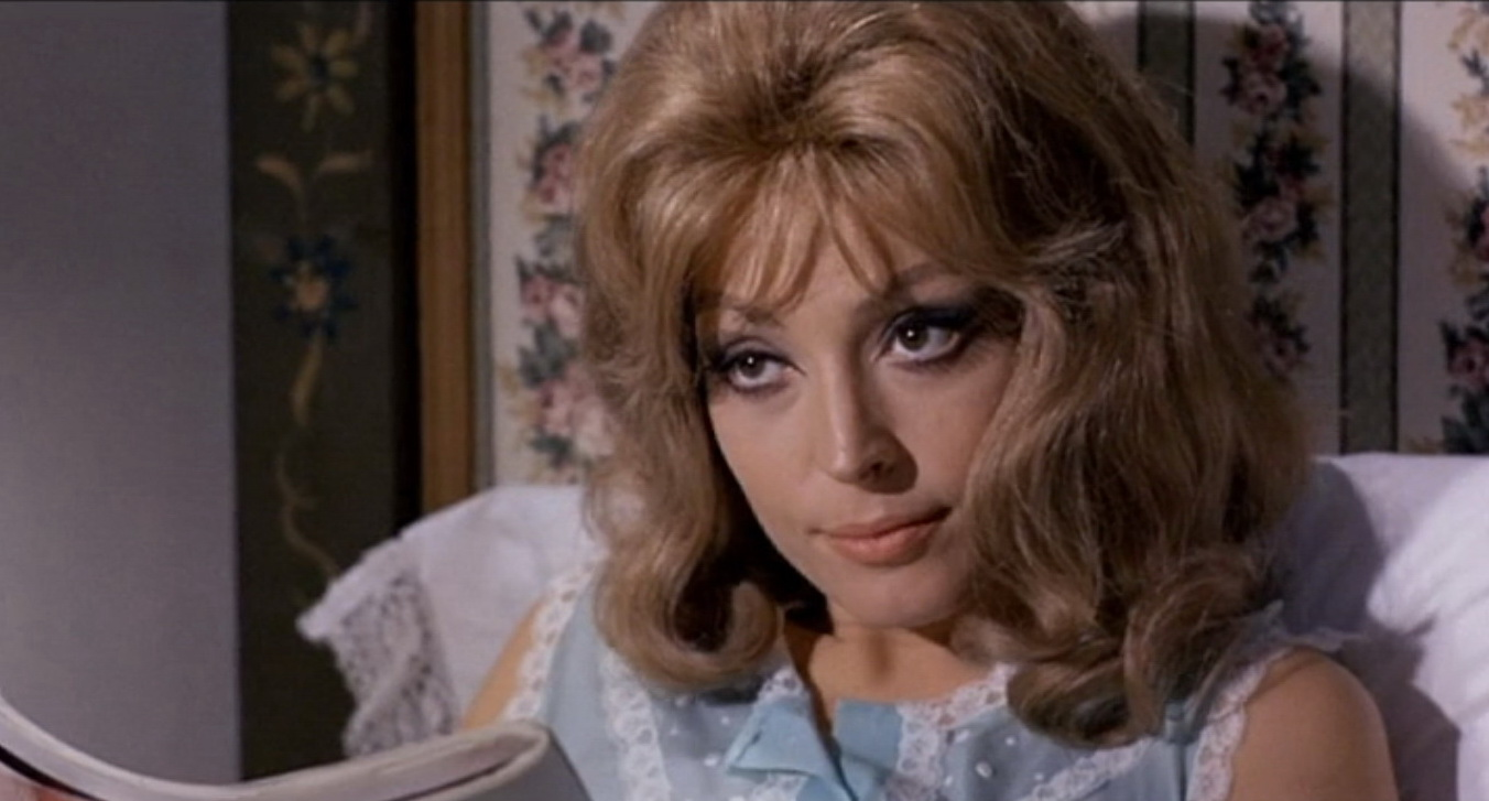 Screenshot dal film Gli infermieri della mutua (1969)